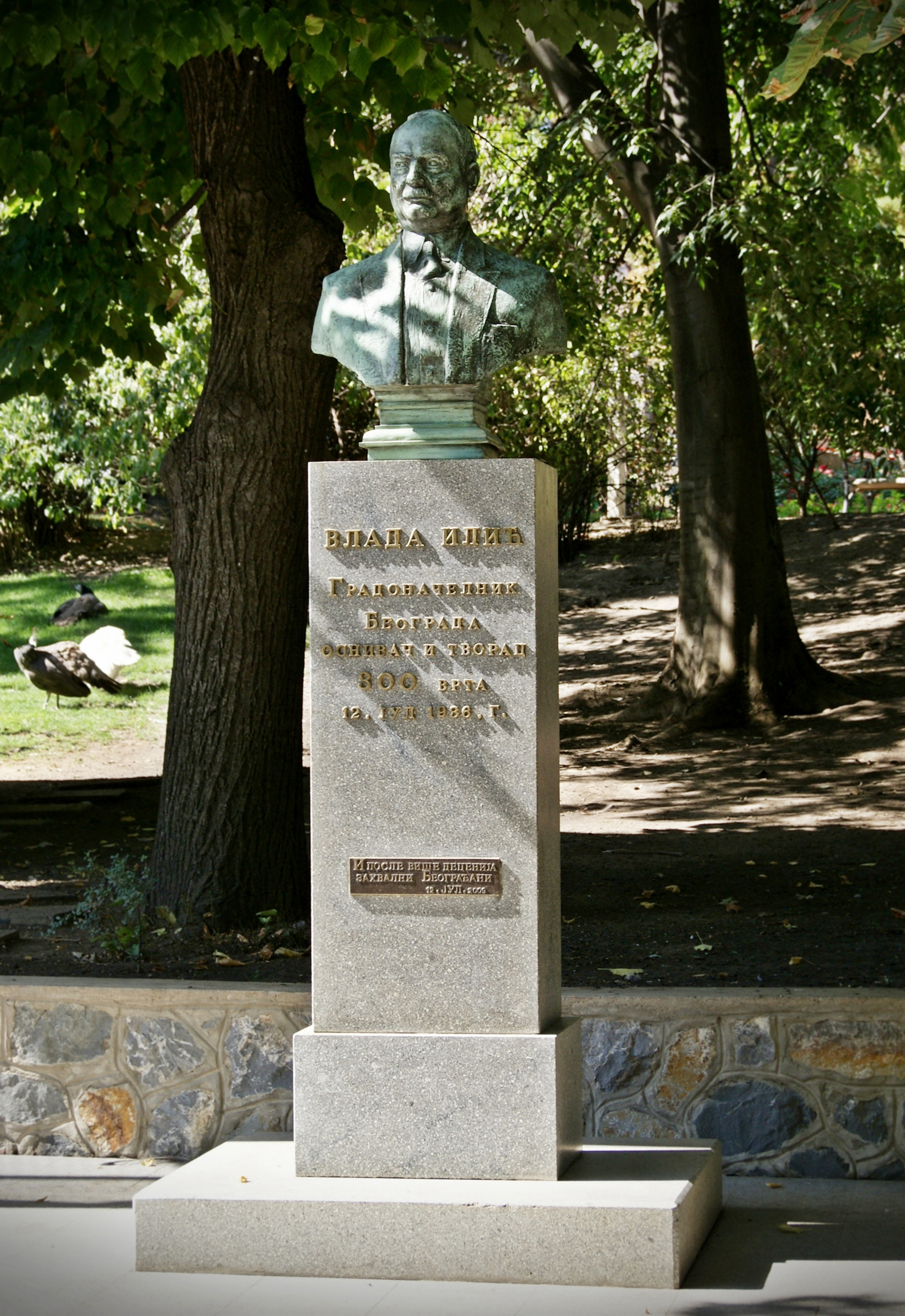 Влада Илић (1882. - 1952)